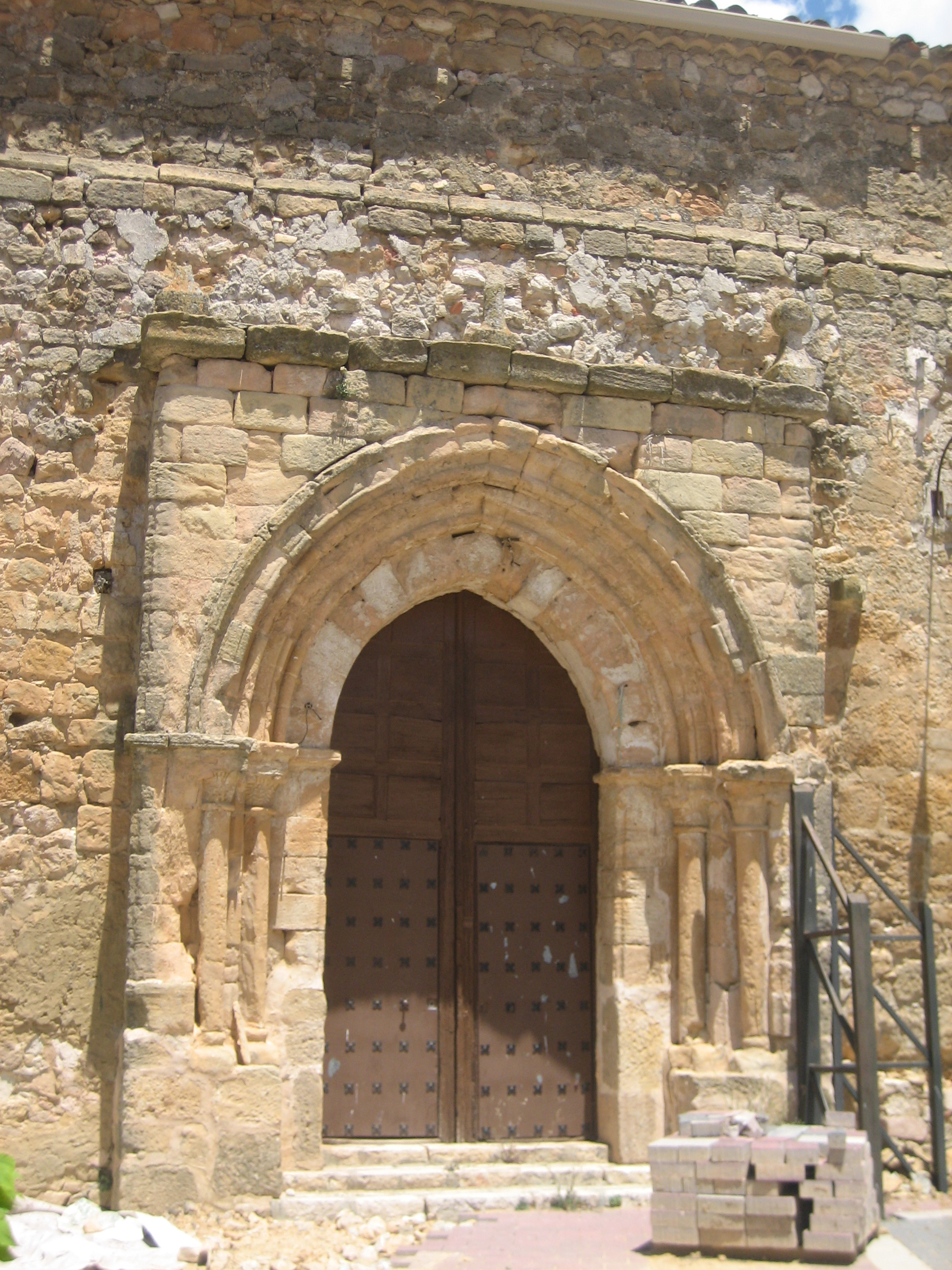 Puerta de la Iglesia de San Pedro Apóstol de Cervera del Llano